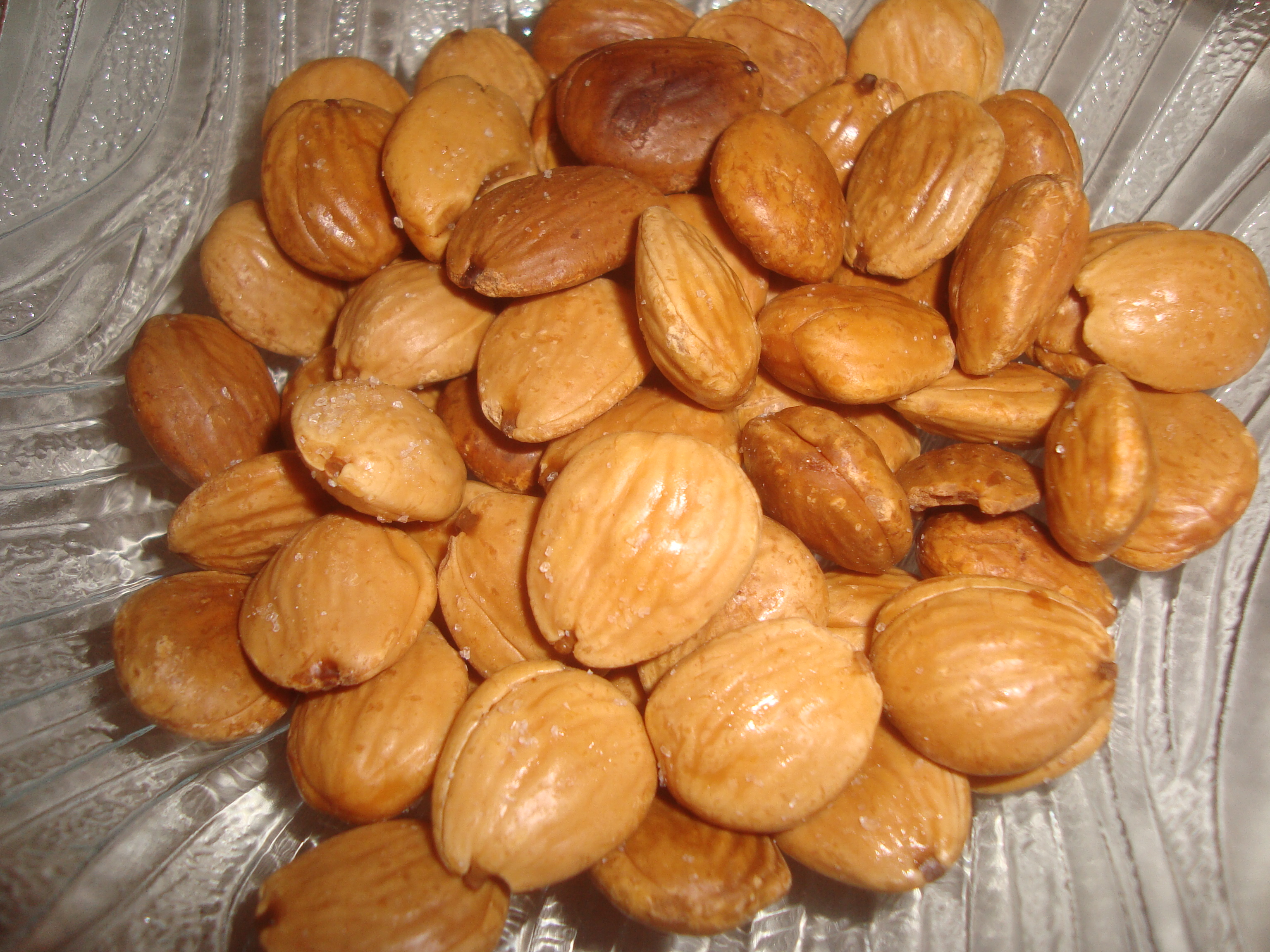 Almendras fritas. This photo has been taken in the country: Spain